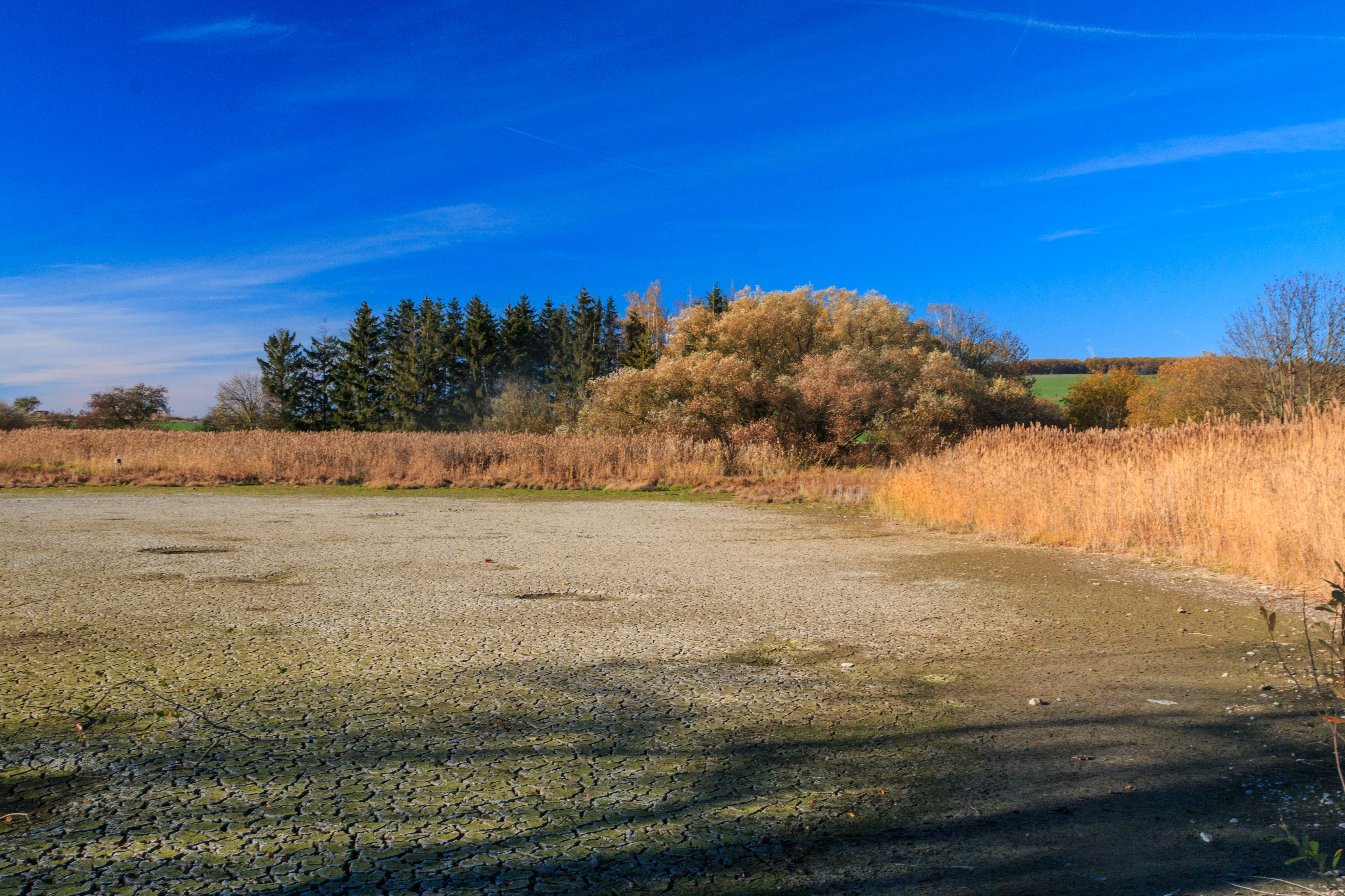 Rybník Suchánek u Dětěnic